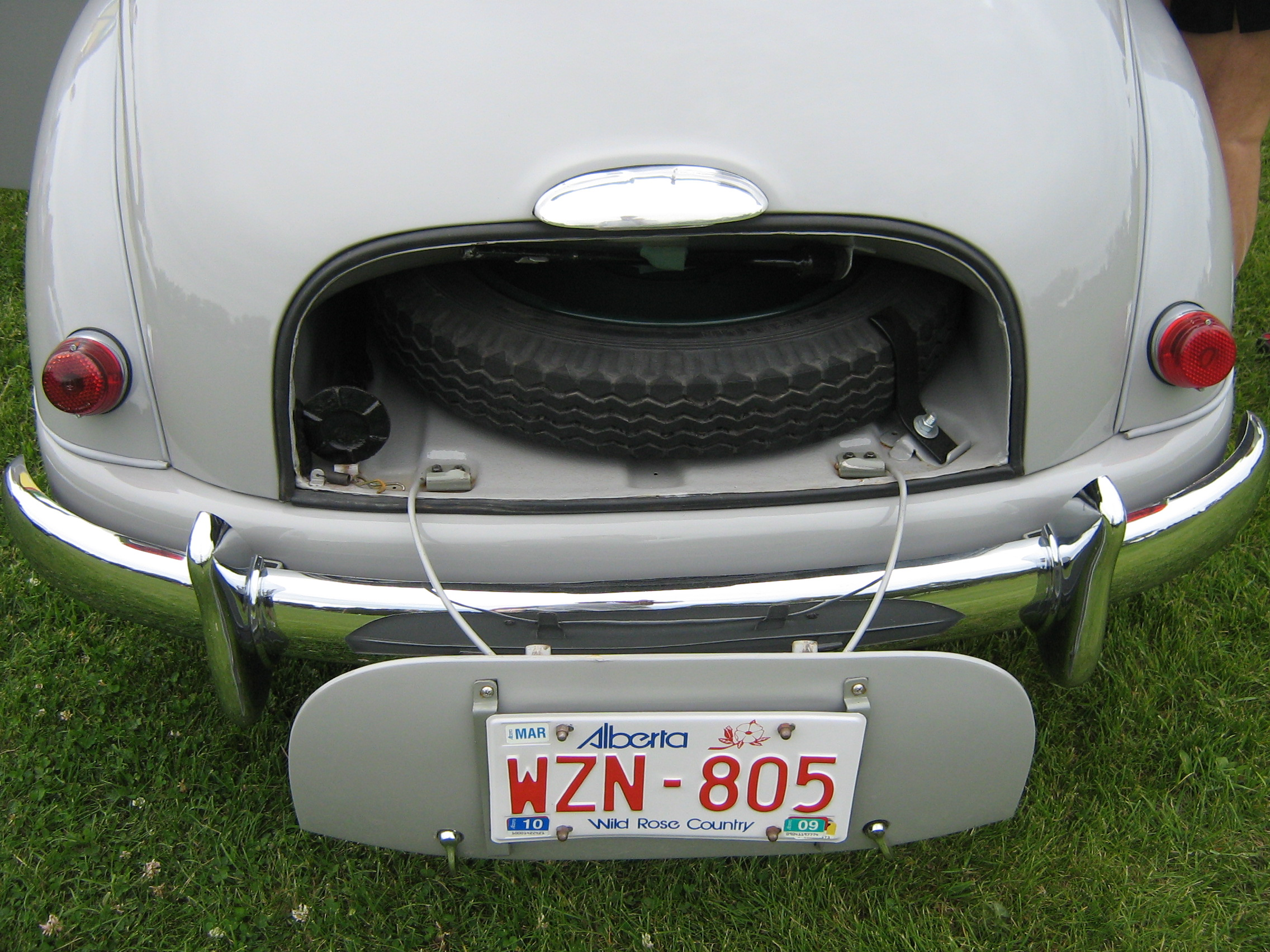 1949 Fiat Topolino